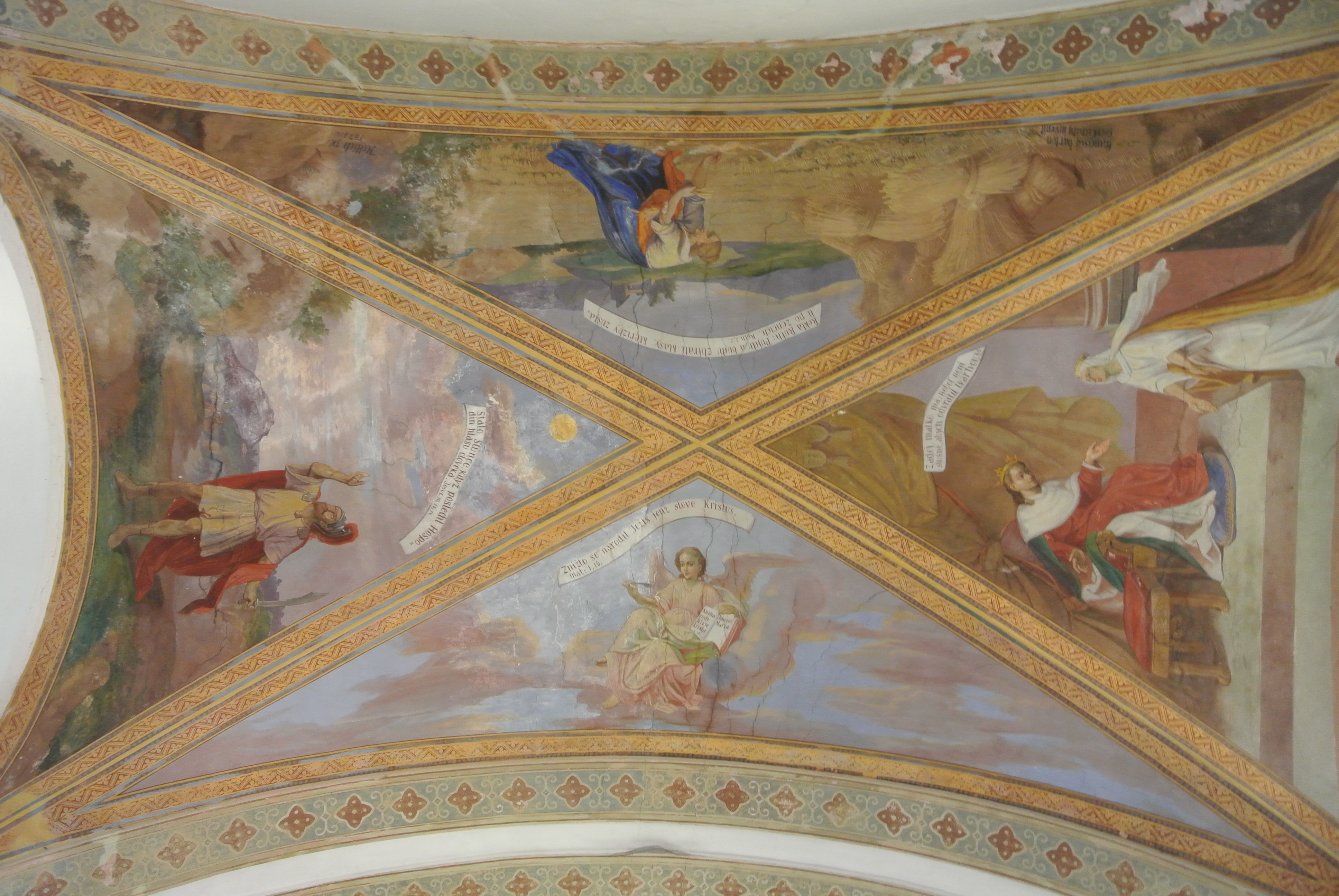 Detaily kostela v Charvatcích